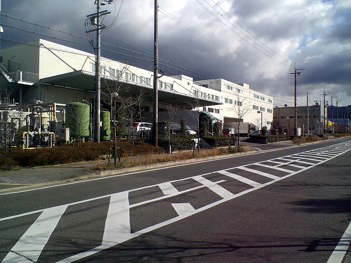 投稿者自身が『豊興サービス株式会社 和泉テクノ営業所』 （大阪府和泉市テクノステージ1-3-23）を撮影。